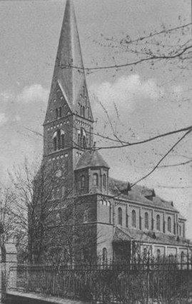 Verden (Aller), kath. Propsteikirche St. Josef